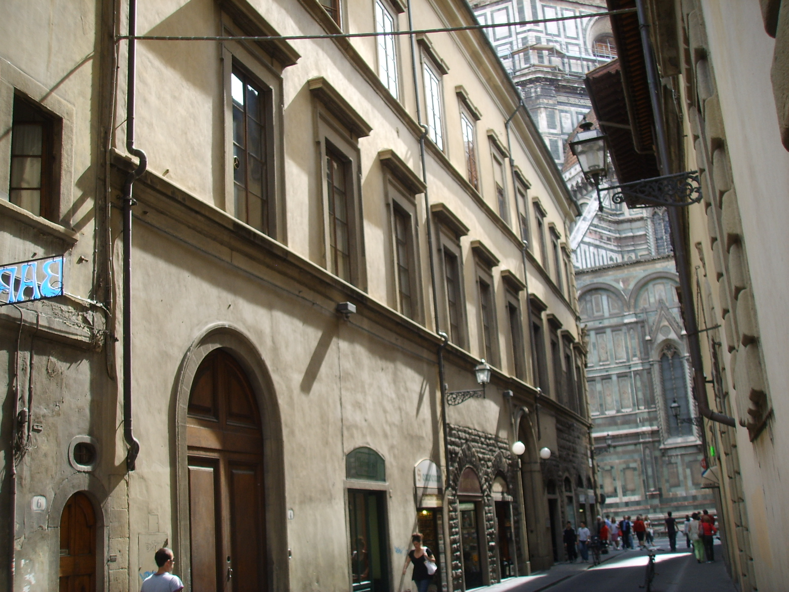 Palazzo_Naldini in Florence